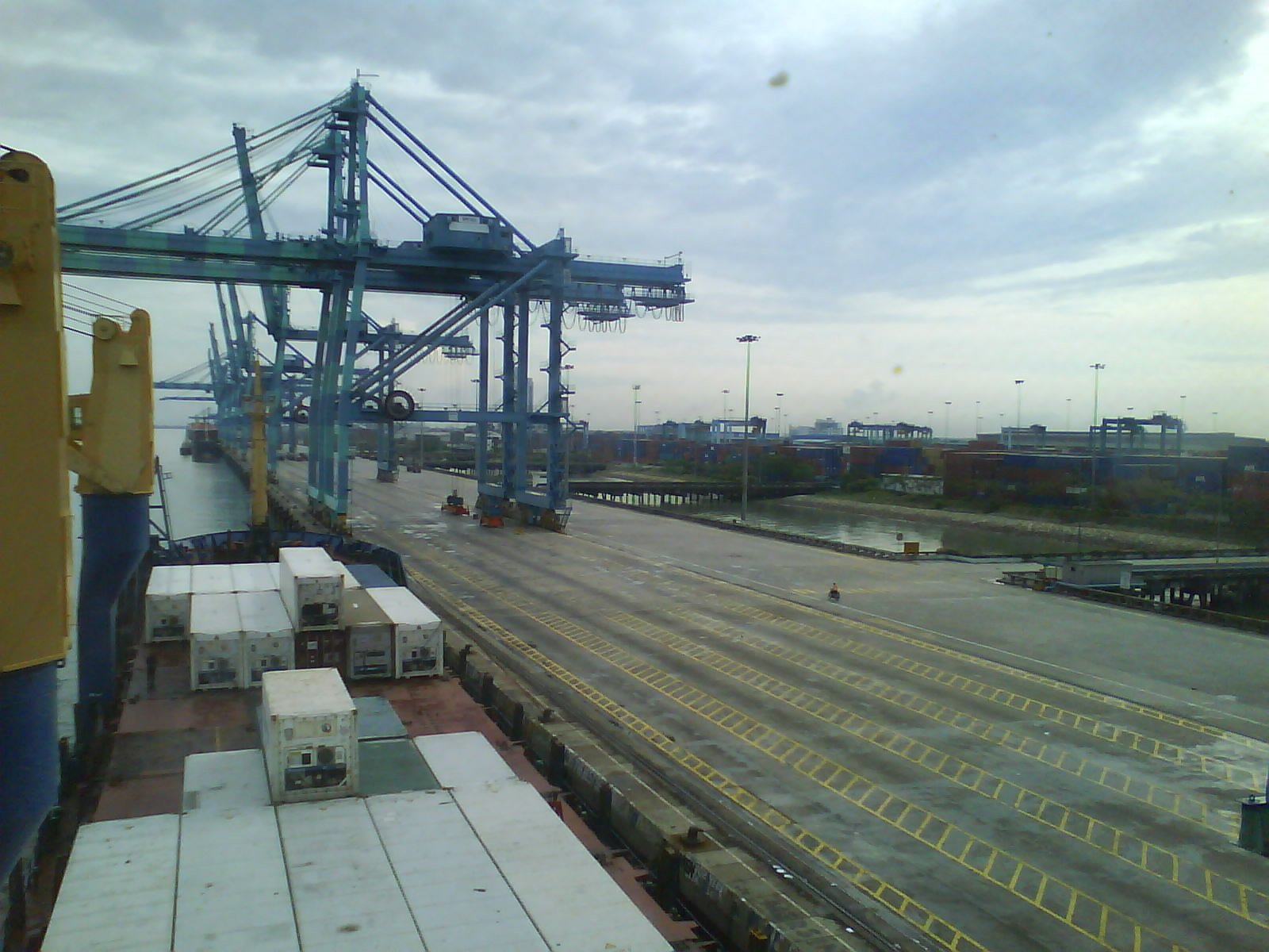 Pemandangan pelabuhan barat dari atas sebuah kapal